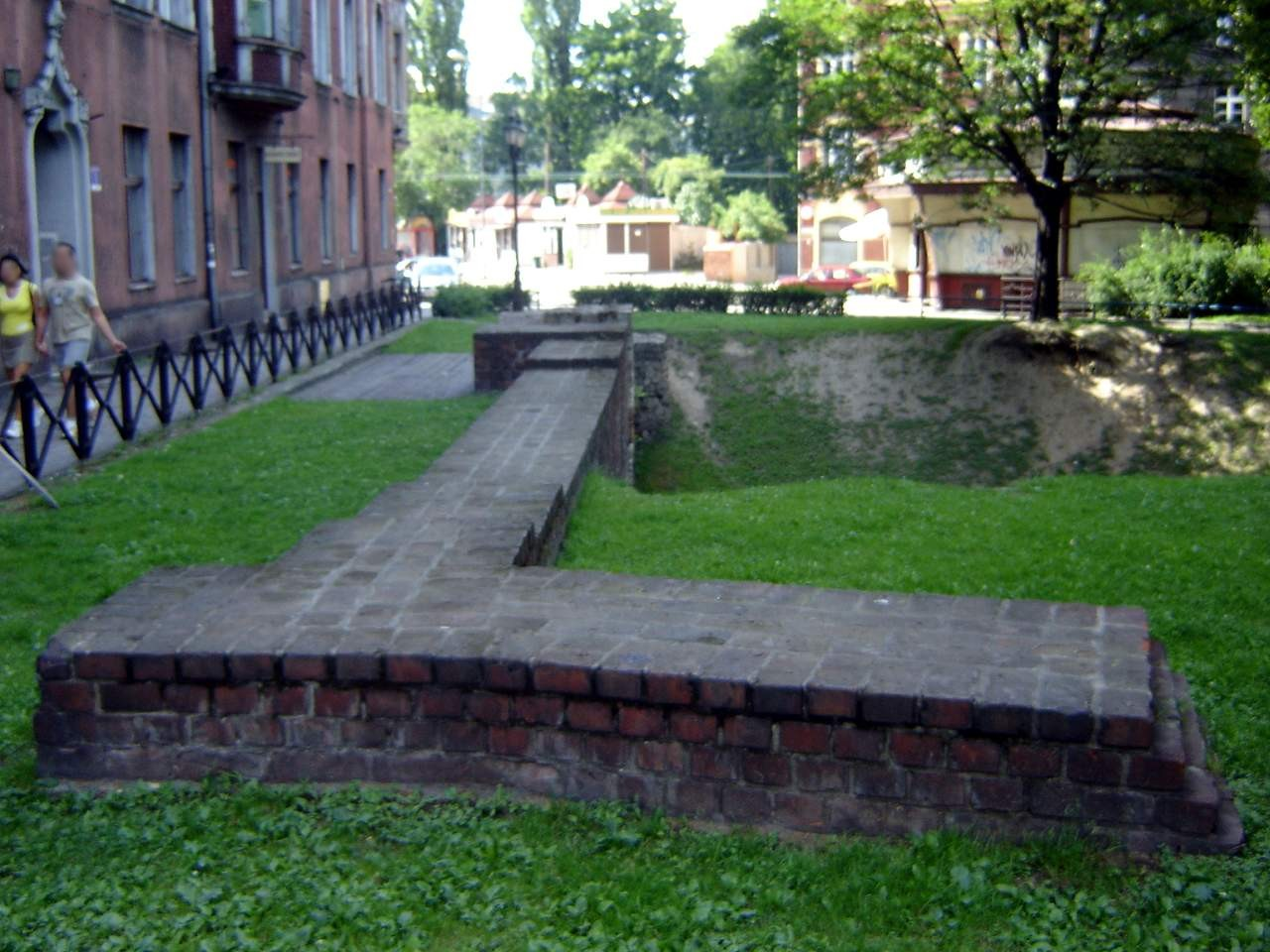 Gliwice - mury miejskie wraz z dwiema bramami (zabytek nr A/1294/83 z 13.01.1983)